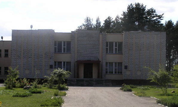 п.Ильич